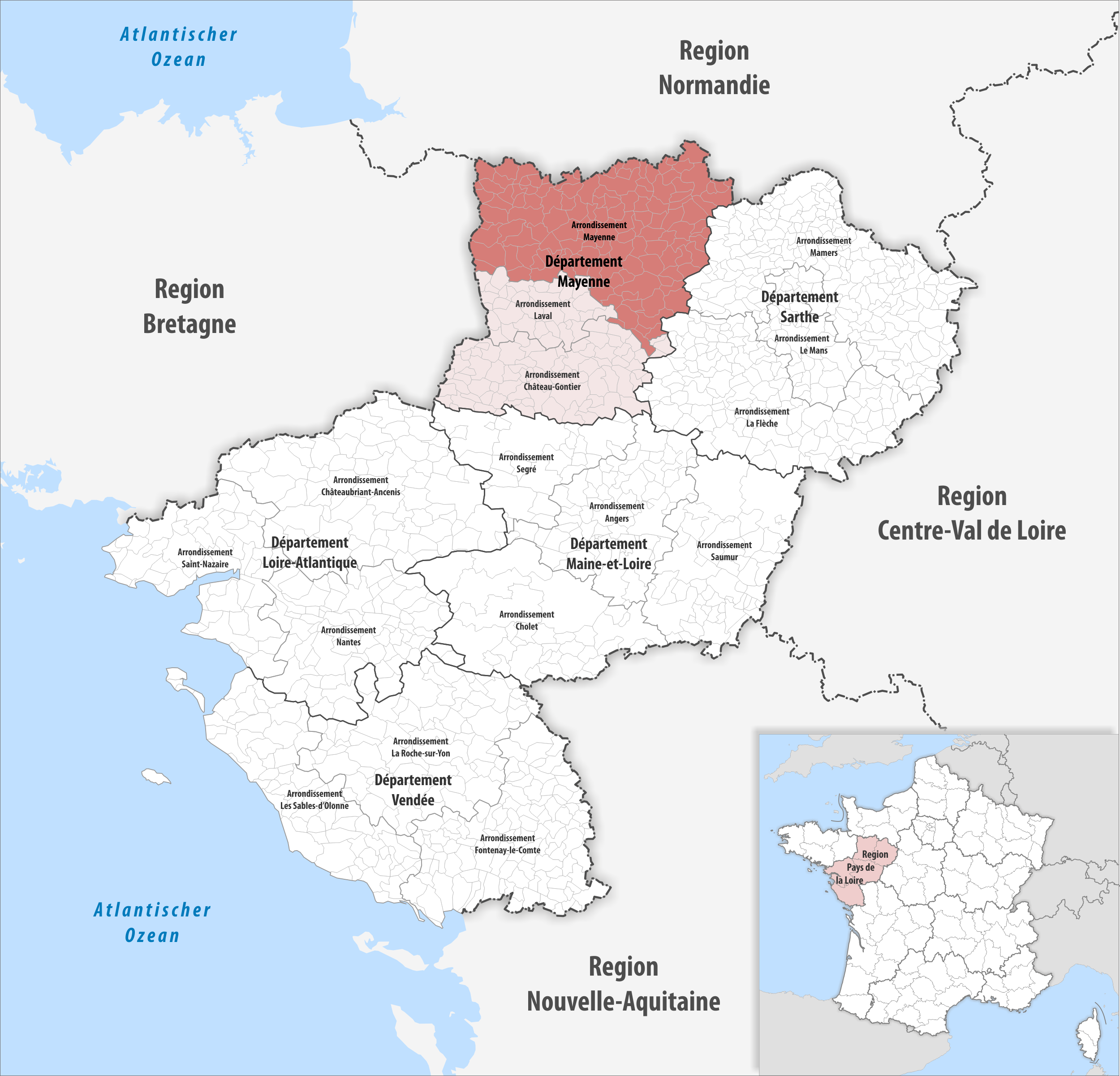 Lage des Arrondissements Mayenne